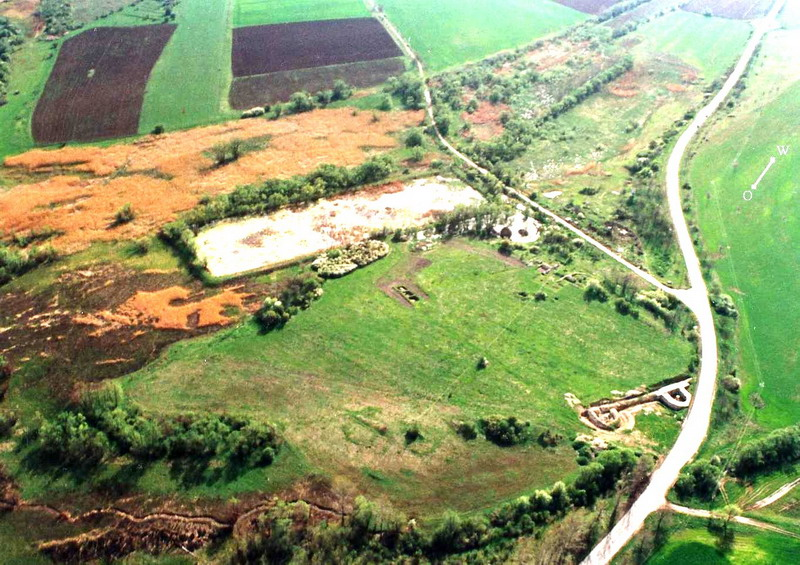 Аероснимка на късноантичната крепост "Ковачевско кале" при град Попово, направена от Владимир Стойков - април 1999 г.